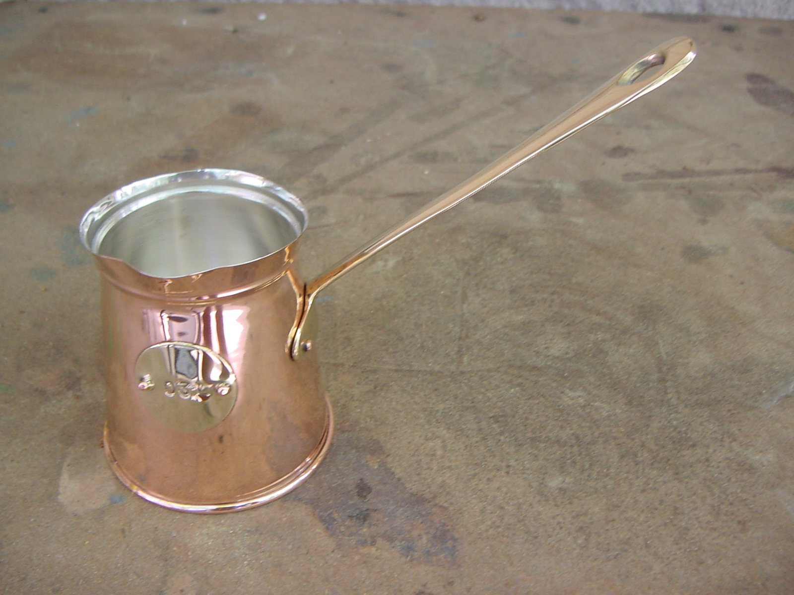 Ibrik coffee brewer